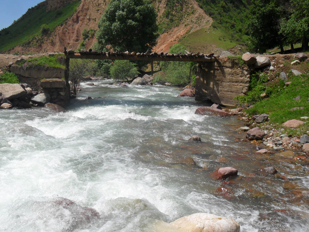 Мост через реку Нуреката. Ташкентская область, Республика Узбекистан